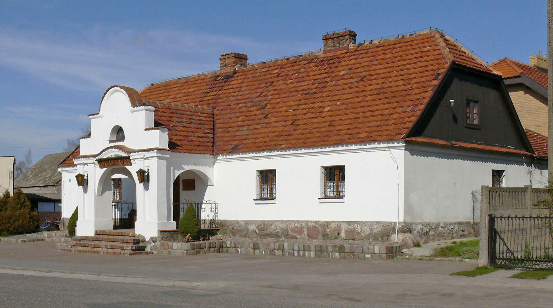 Ptaszkowo - karczma (zabytek nr rejestr. 2499/A)